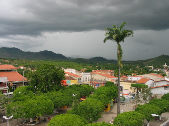 Foto mostrando céu nublado e vegetação verdejante da cidade de Baturité, clima típico de Caatinga na época chuvosa.